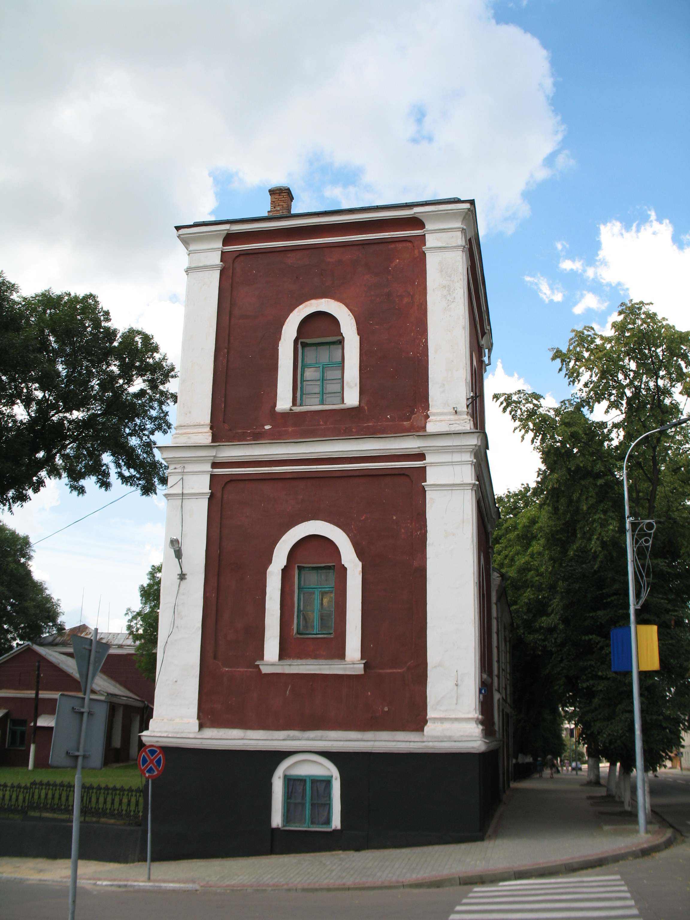 Володимир Волинський. Дзвіниця Домініканського монастиря